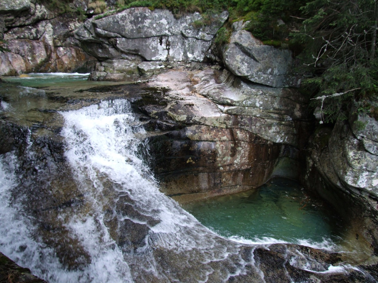 Kotły eworsyjne na Zimnej Wodzie w rejonie Wodospadów Zimnej Wody